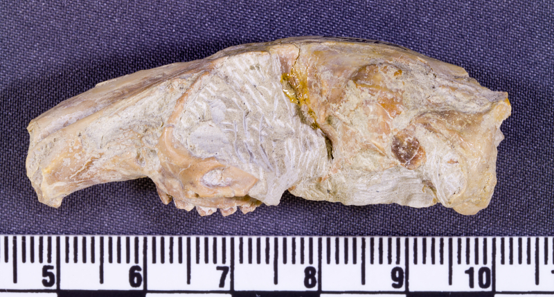 cráneo de Palaeolagus